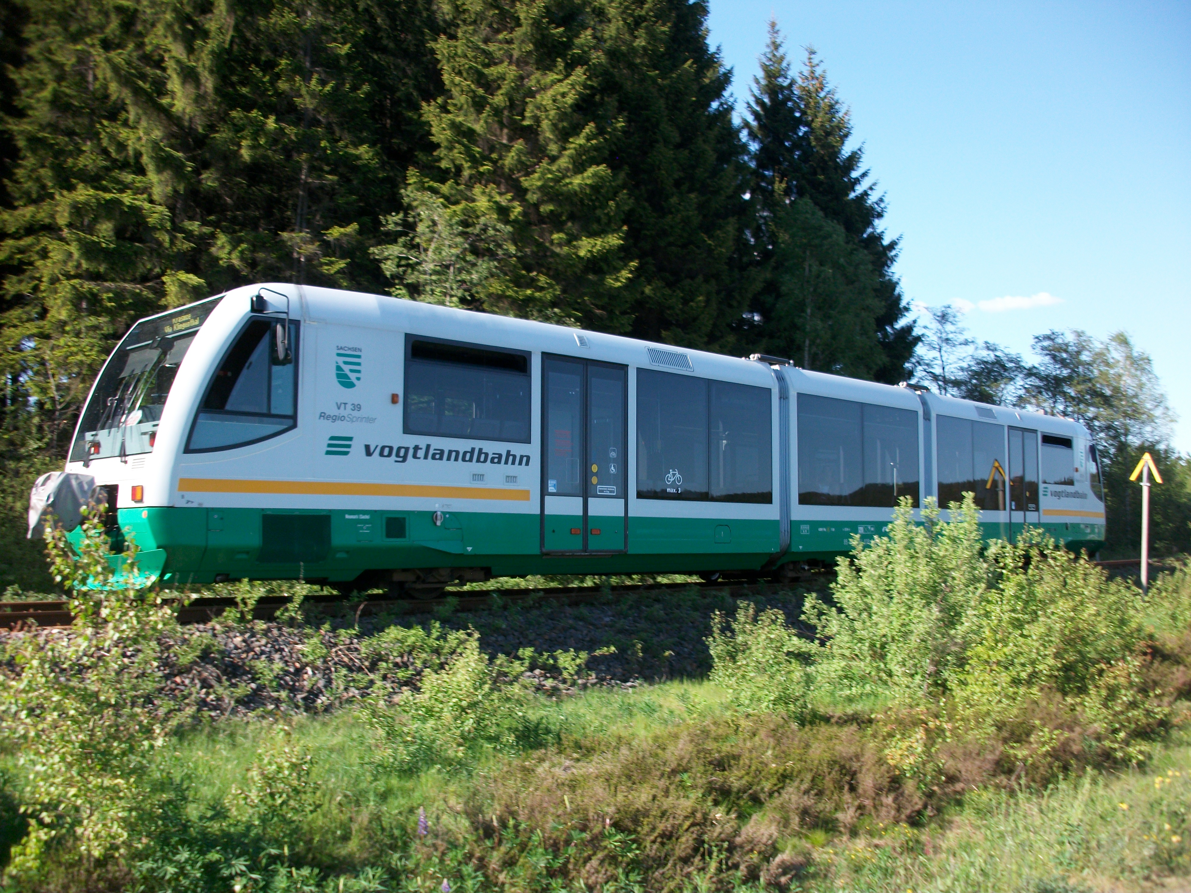 Triebwagen der Vogtlandbahn bei der Talsperre Muldenberg (2017)